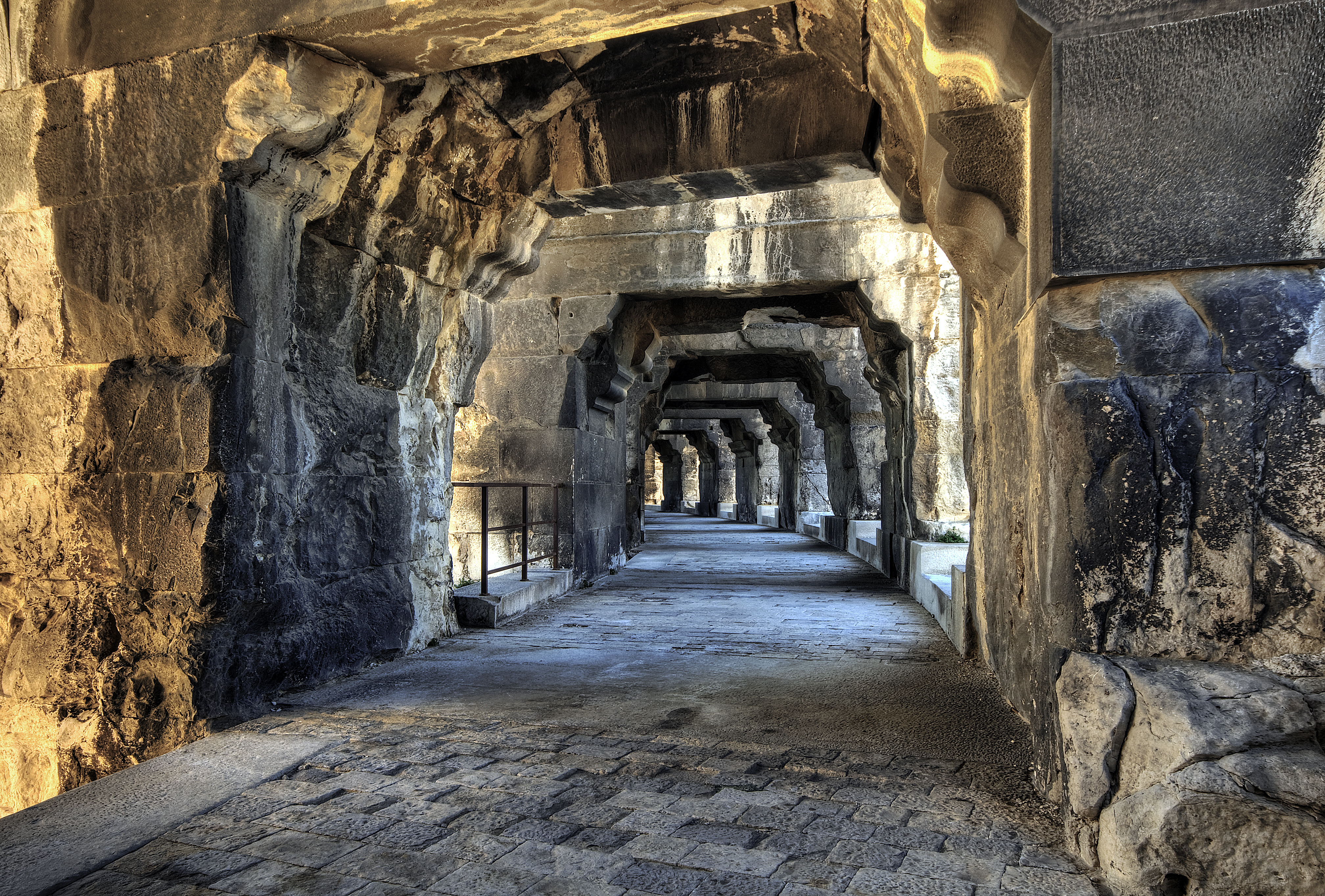 Arènes de Nîmes ist ein römisches Amphitheater in der französischen Stadt Nîmes.